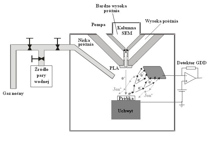 Schemat budowy środowiskowego skaningowego mikroskopu elektronowego